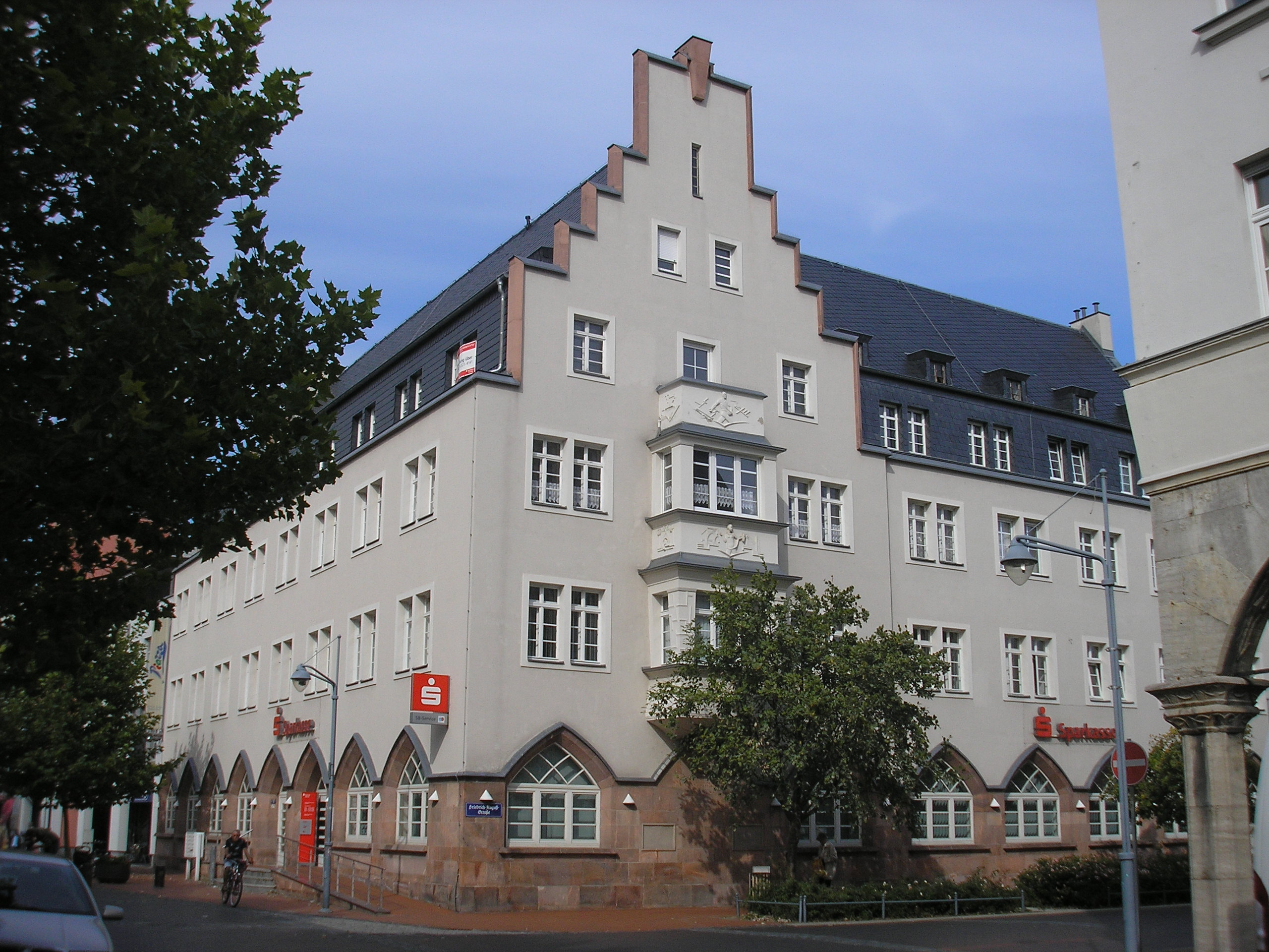 Das Gebäude der Sparkasse in Crimmitschau (Sachsen).